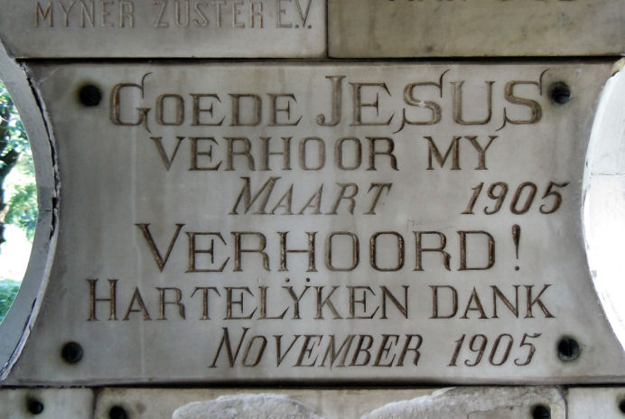 ex voto